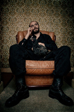 Le compositeur français de musique électronique Igorrr en novembre 2010 à Lezoux (France).